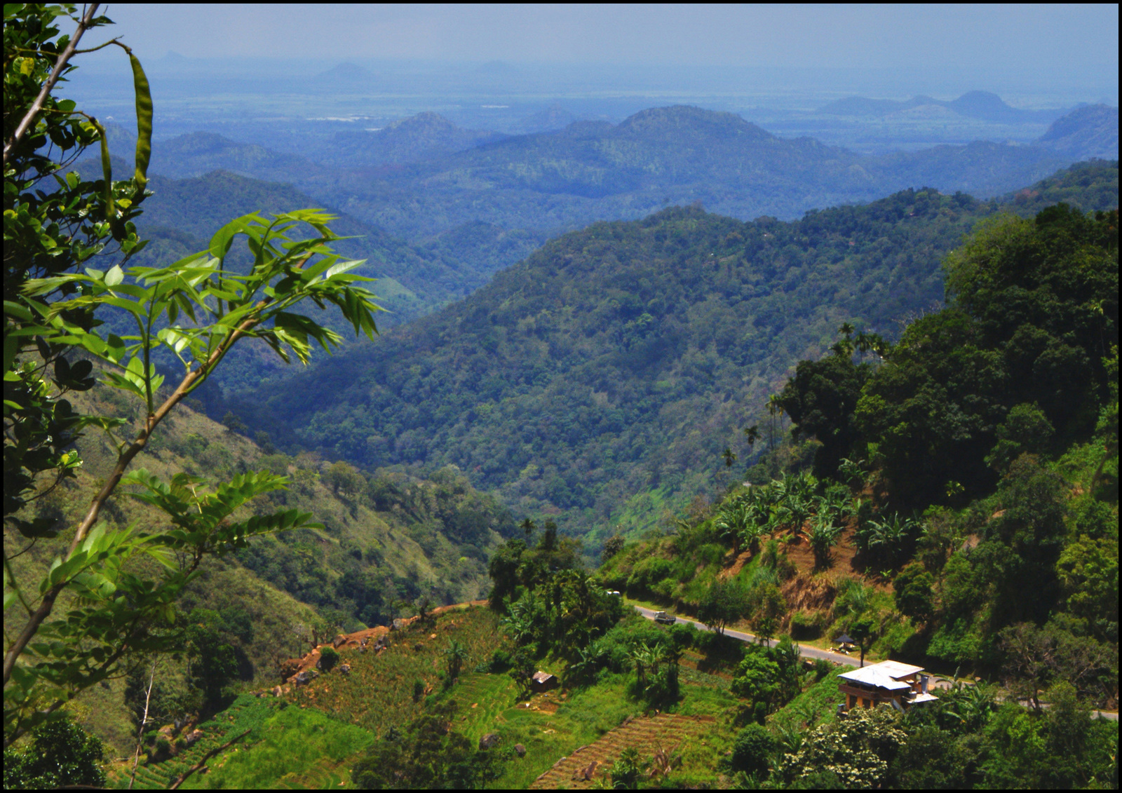 Ella to Wellawaya, Sri Lanka